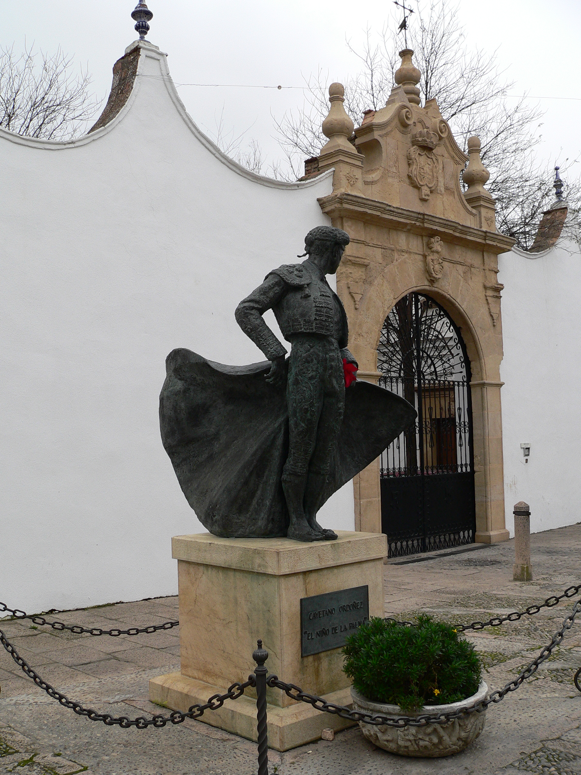 Description: Cayetano Ordóñez Subject: “El Niño de la Palma” City : Plaza de Toros de Ronda Country : Spain Photographer: © Manuel González Olaechea y Franco Shot date : December, 25th, 2005